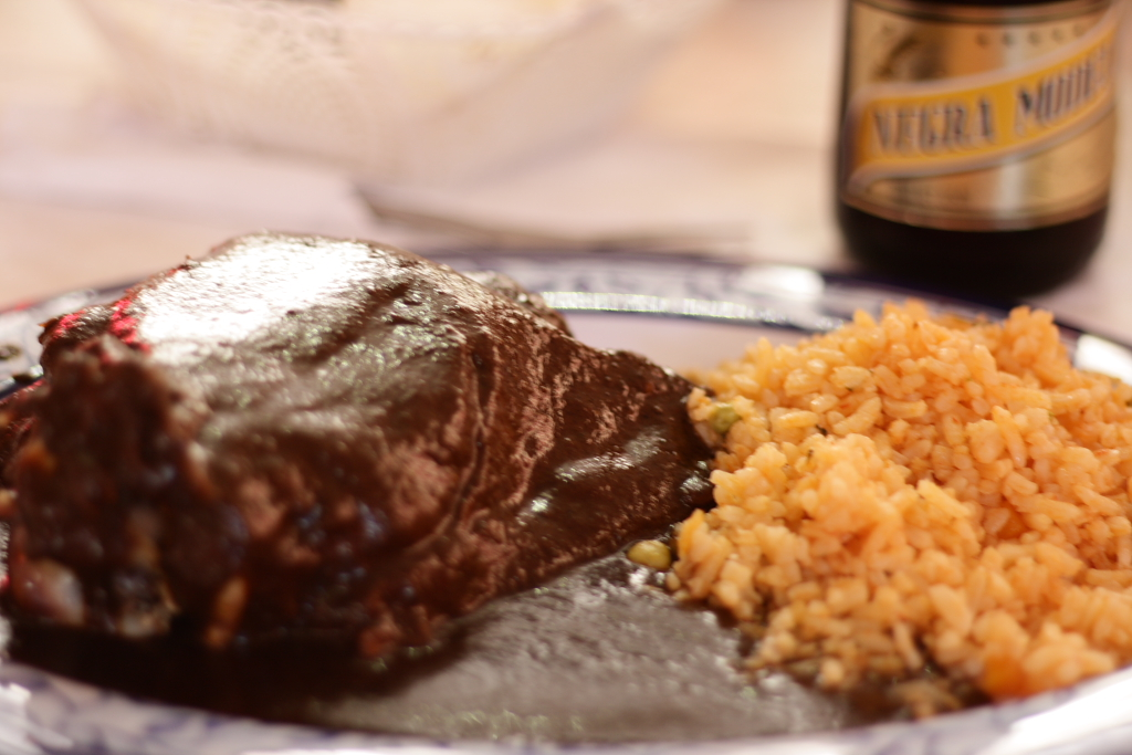 Pollo enmolado con arroz a la mexicana